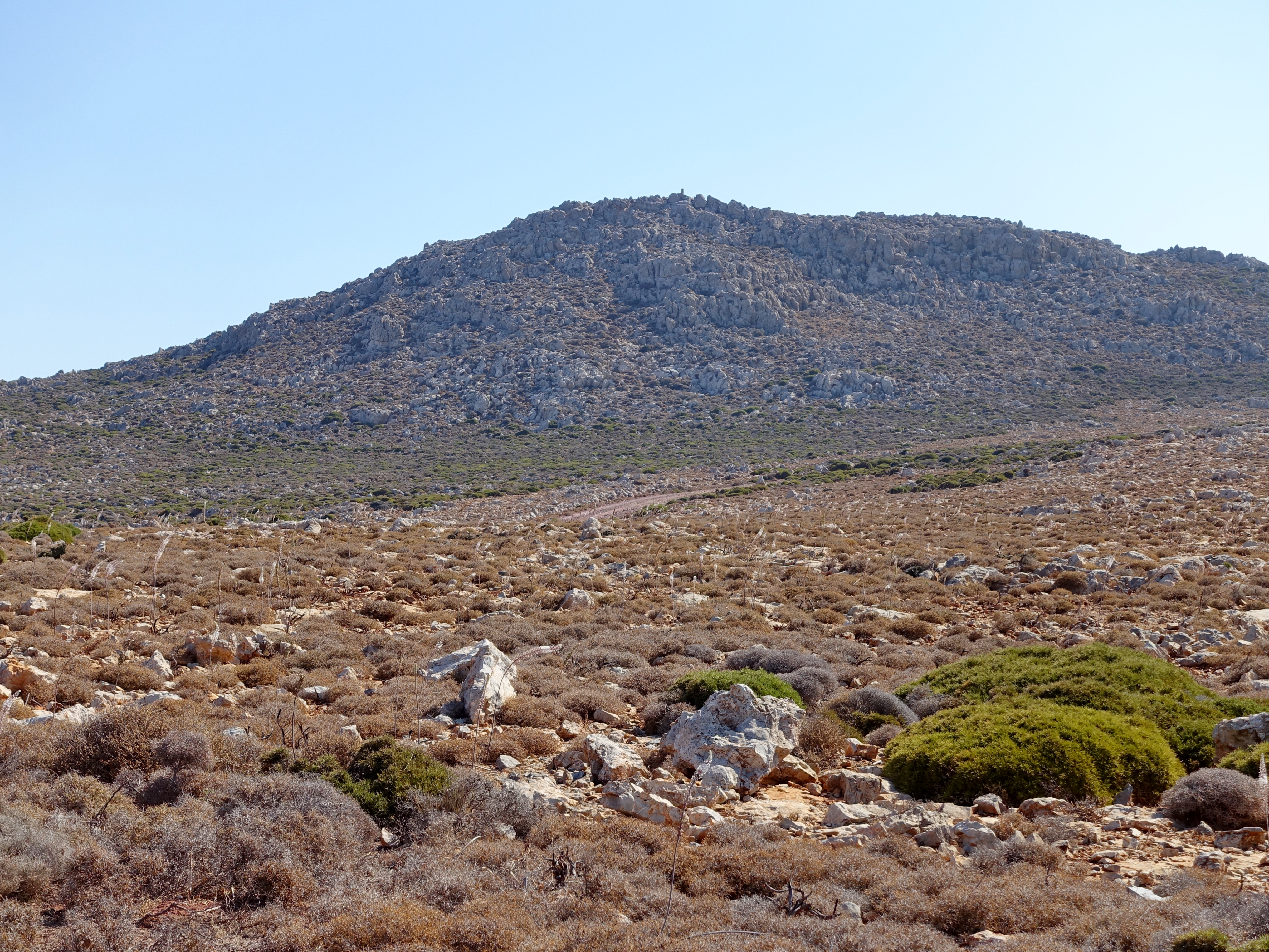 Südwestansicht des Berges mit dem minoischen Gipfelheiligtum Traostalos, Gemeinde Sitia, Kreta, Griechenland